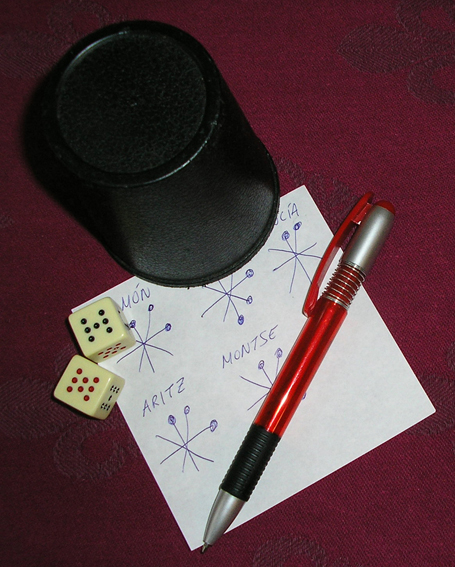 Elementos requeridos para jugar al Kiriki.